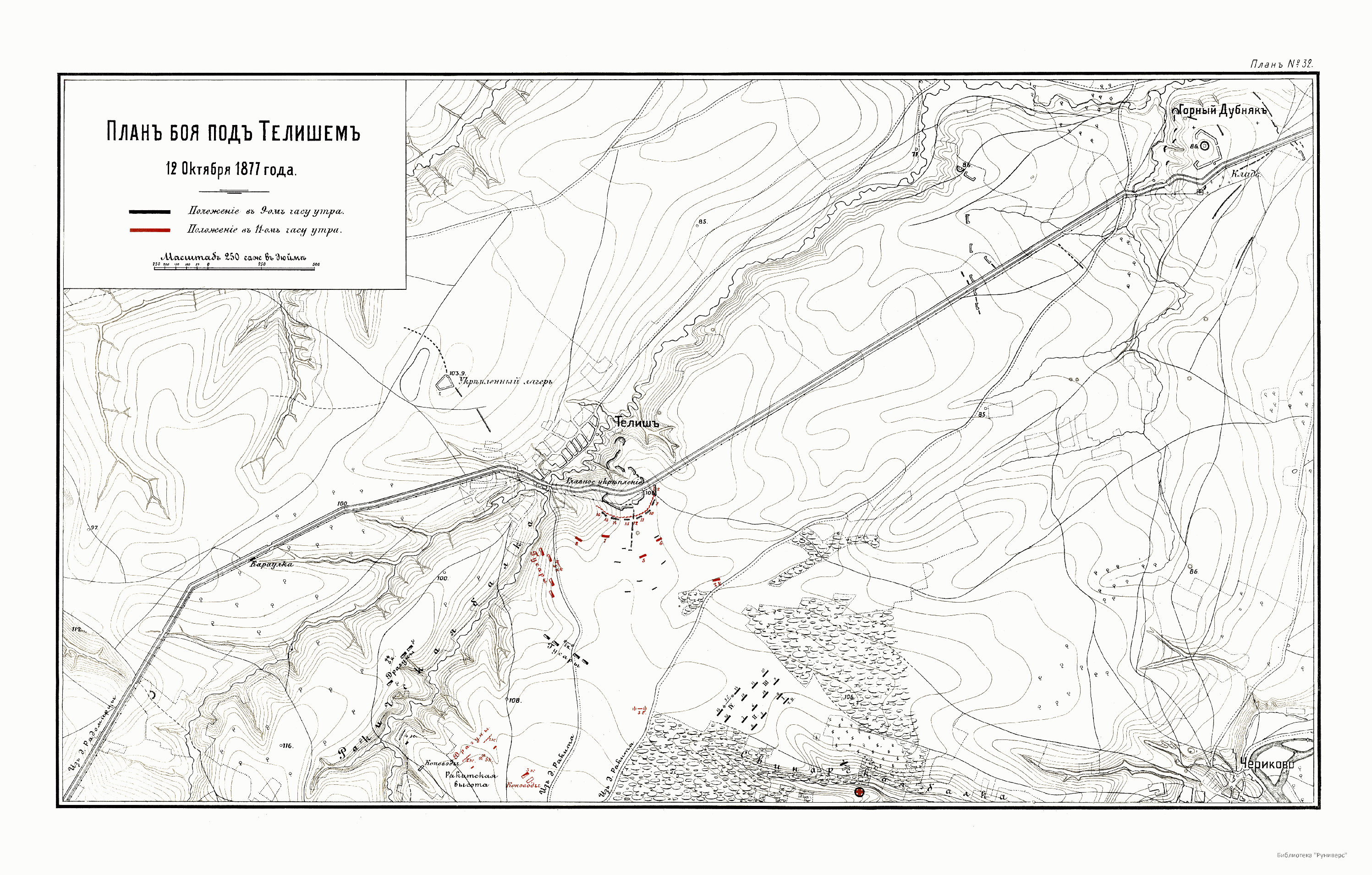 Битката при Телиш